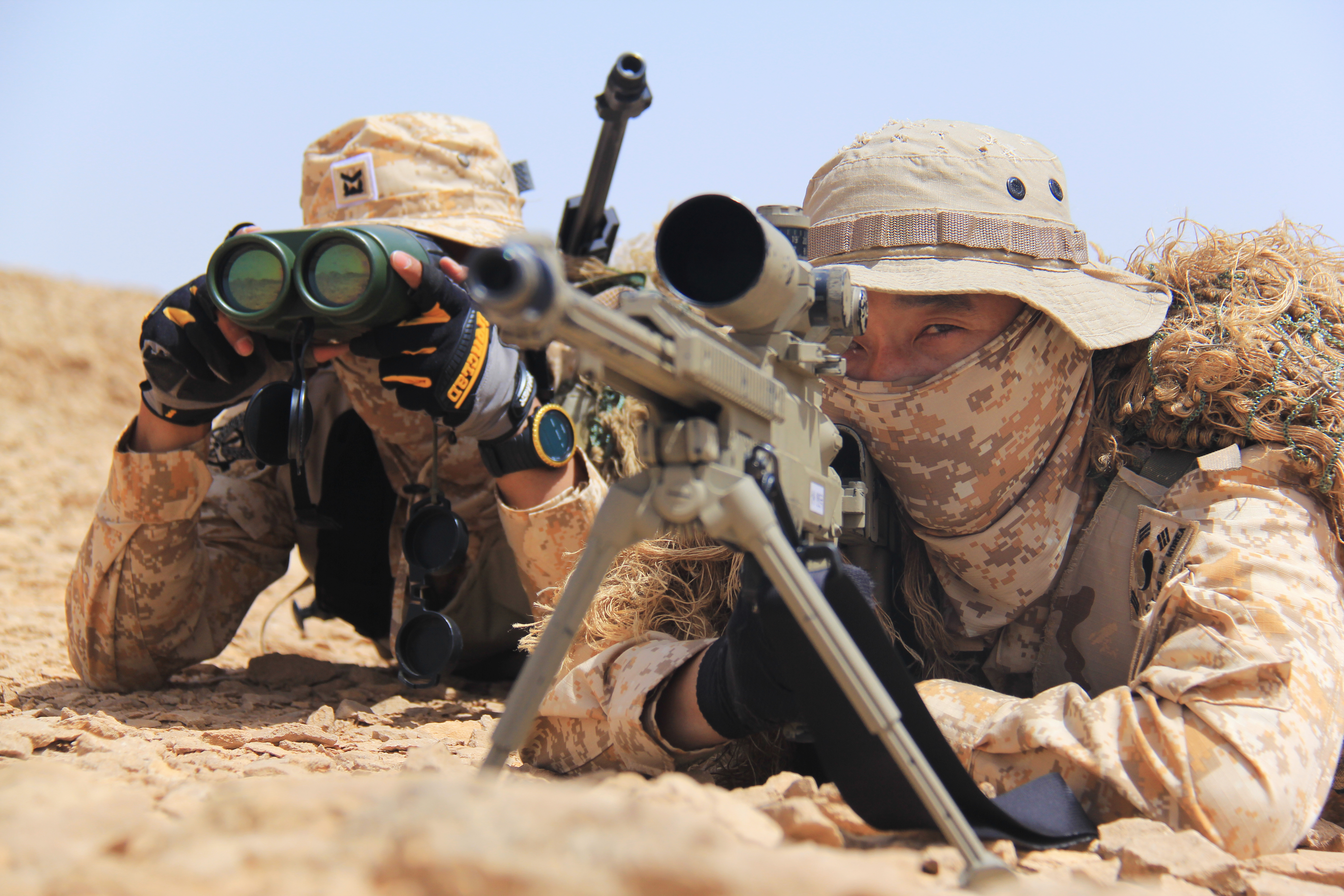 14일(현지시간) 아랍에미리트 (UAE)에서 임무 수행 중인 아크부대의 저격수들이 현지 위장술을 익히면서 사격훈련에 전념하고 있다.